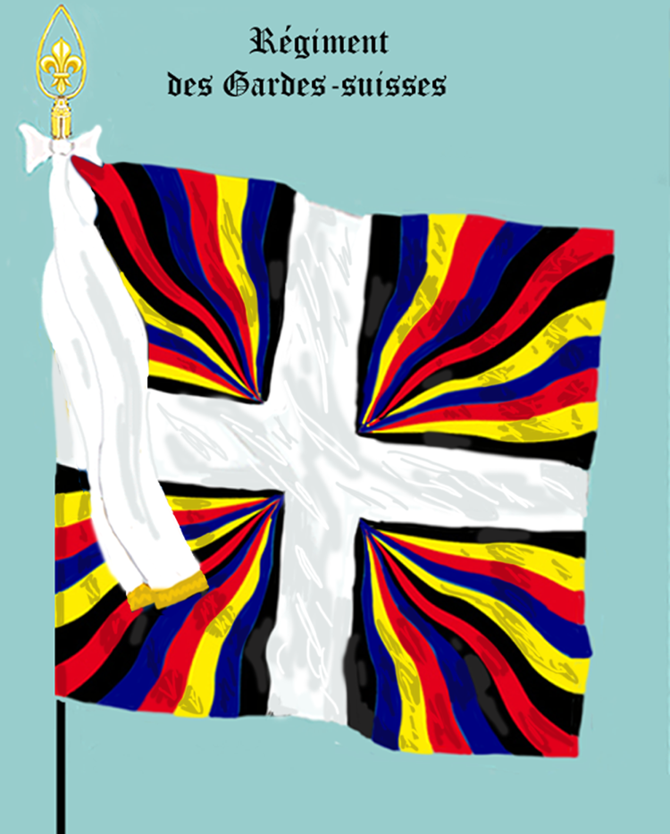 Ordonnanzfahne eines Fremdenregiments im königlich französischen Dienst. (Schweizer Regiment) - Entnommen und überarbeitet aus: „LES UNIFORMES ET LES DRAPEAUX DE L'ARMÉE DU ROI“ Marseille 1899. - Drapeau d'Ordonnance d' un régiment étranger au service française (régiment suisse.)